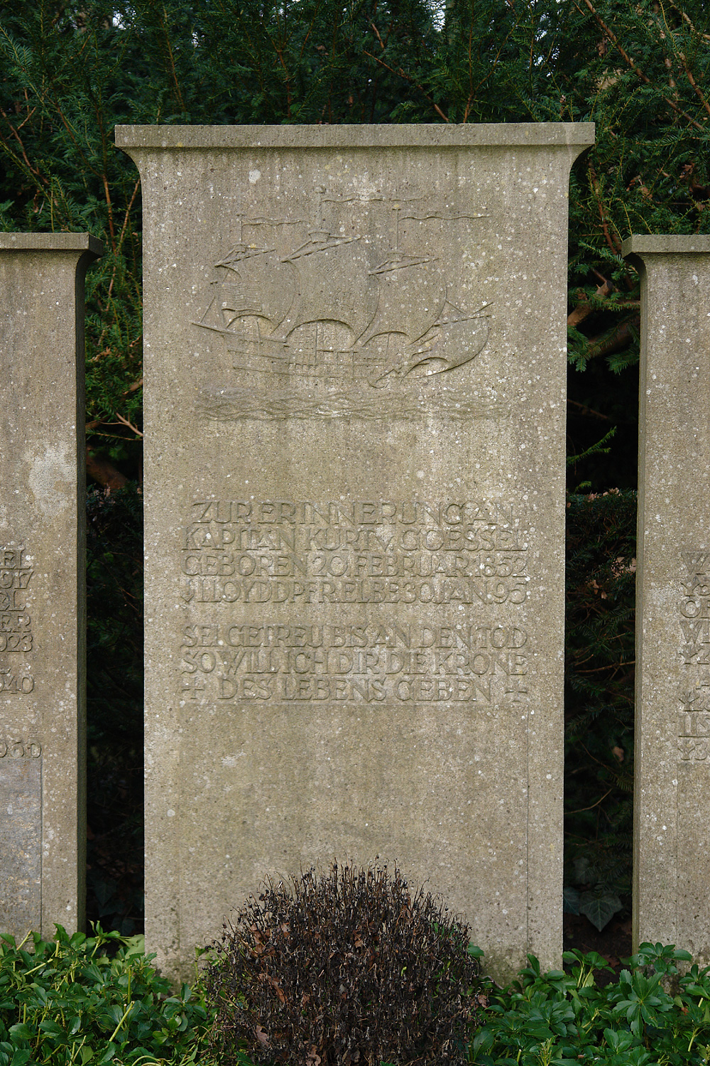 Osterholzer Friedhof in Bremen: Grabstein Kurt von Goessel (1852-1895). Kapitän des Dampfers Elbe des Norddeutschen Lloyd (untergegangen am 30.Jan.1895)